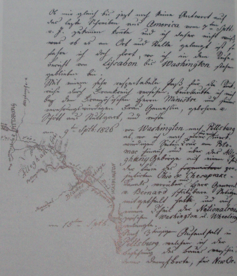 Ausschnitt aus einem Brief August Friedrich Duttenhofers an Cotta, 1827